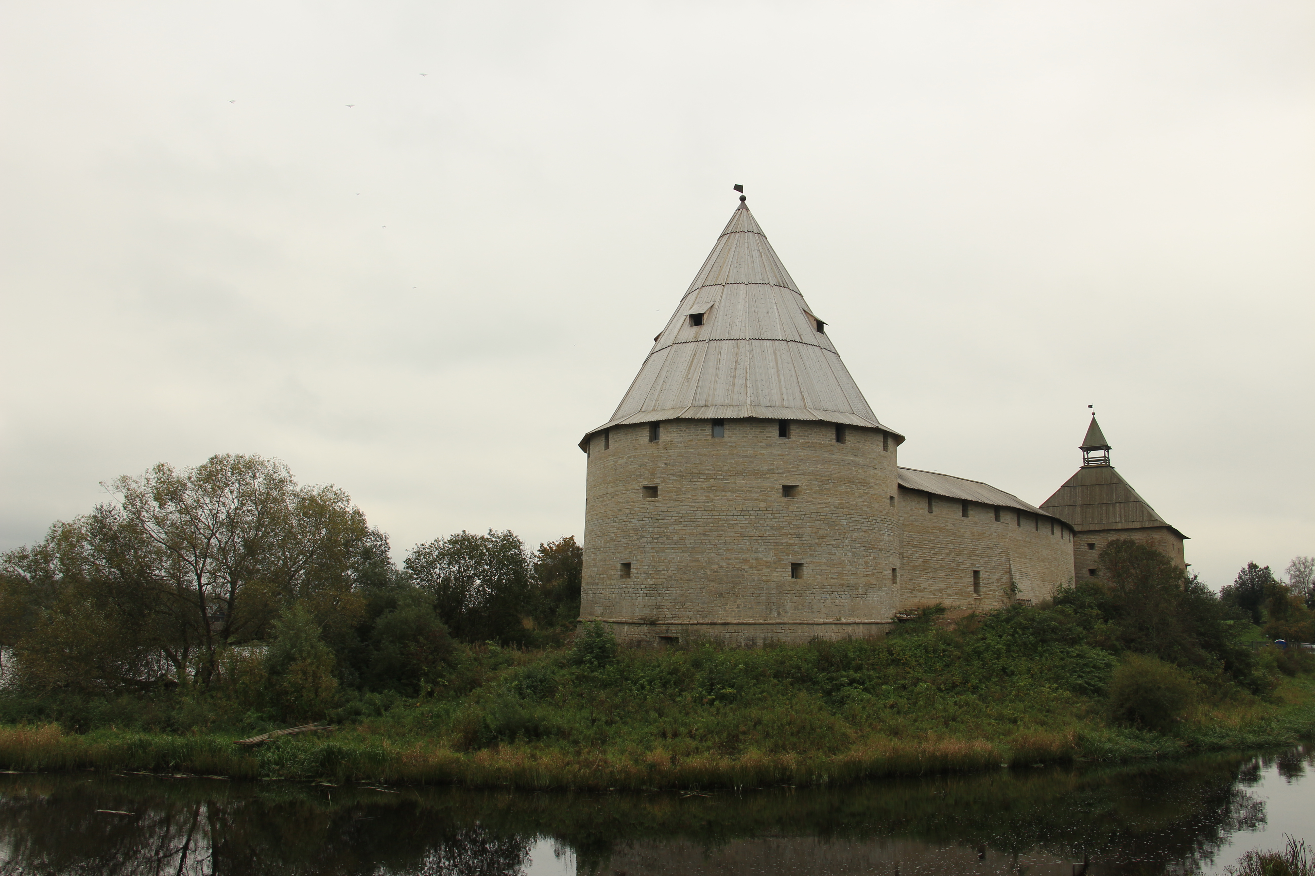 Крепость "Старая Ладога": Старая Ладога, Старая Ладога, Волховский район, Ленинградская область